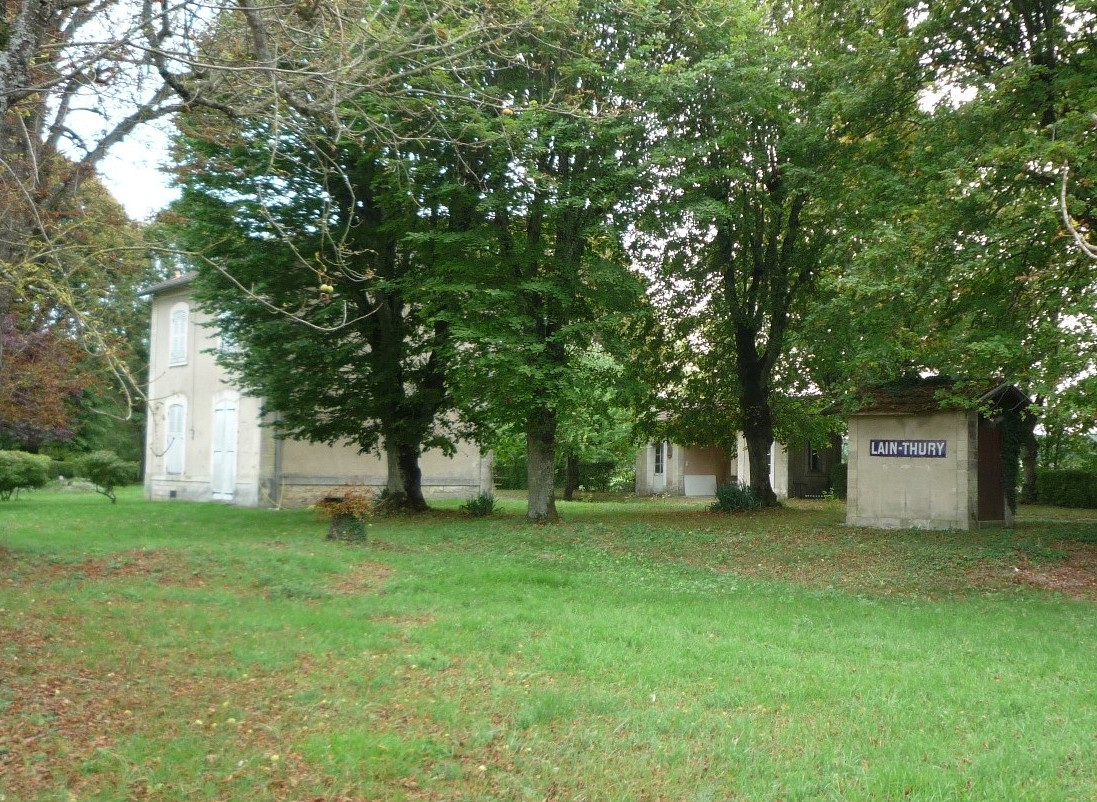 ancienne ligne de Triguères Surgy, la gare de Lain Thury (Yonne)